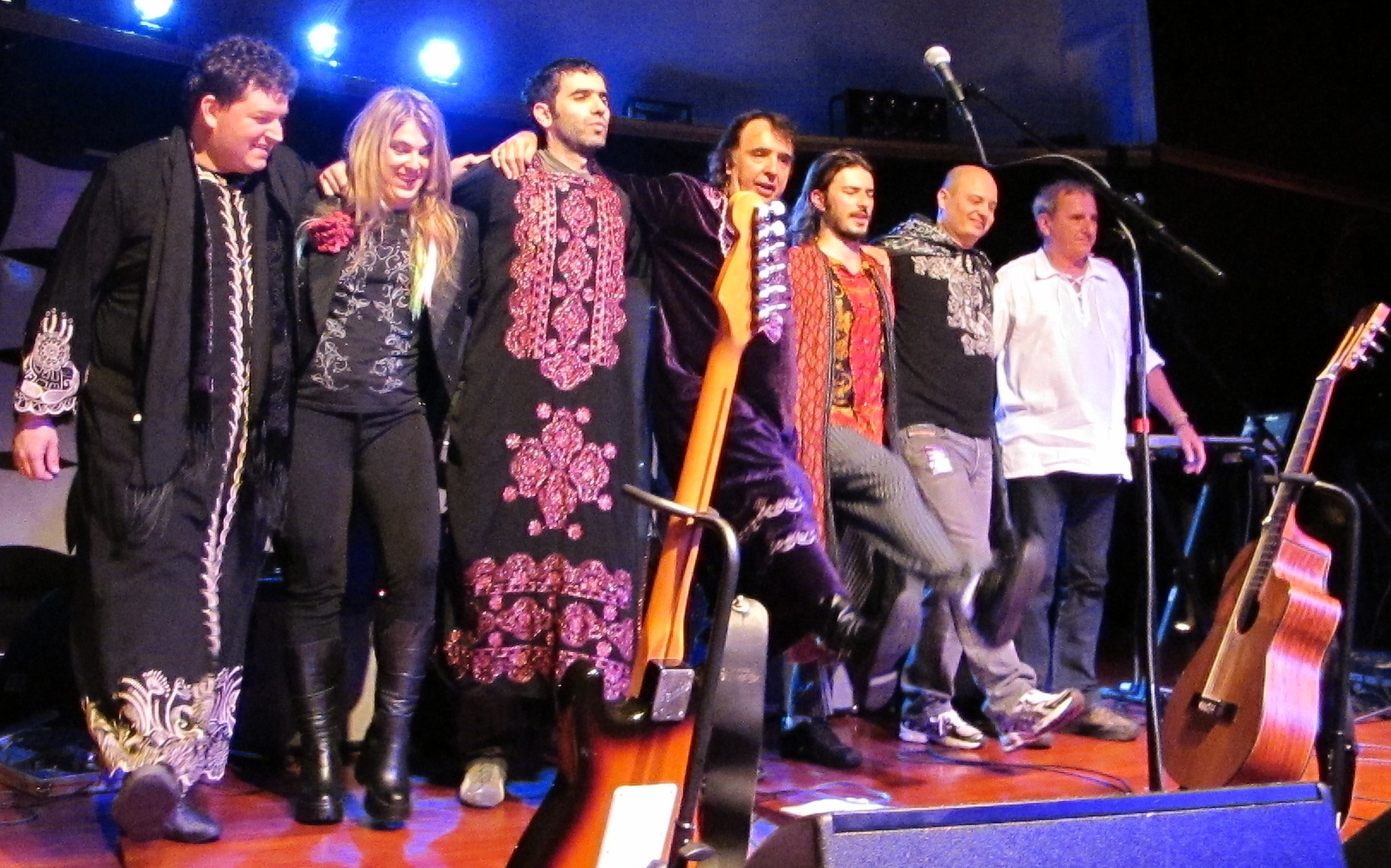 Os Mutantes